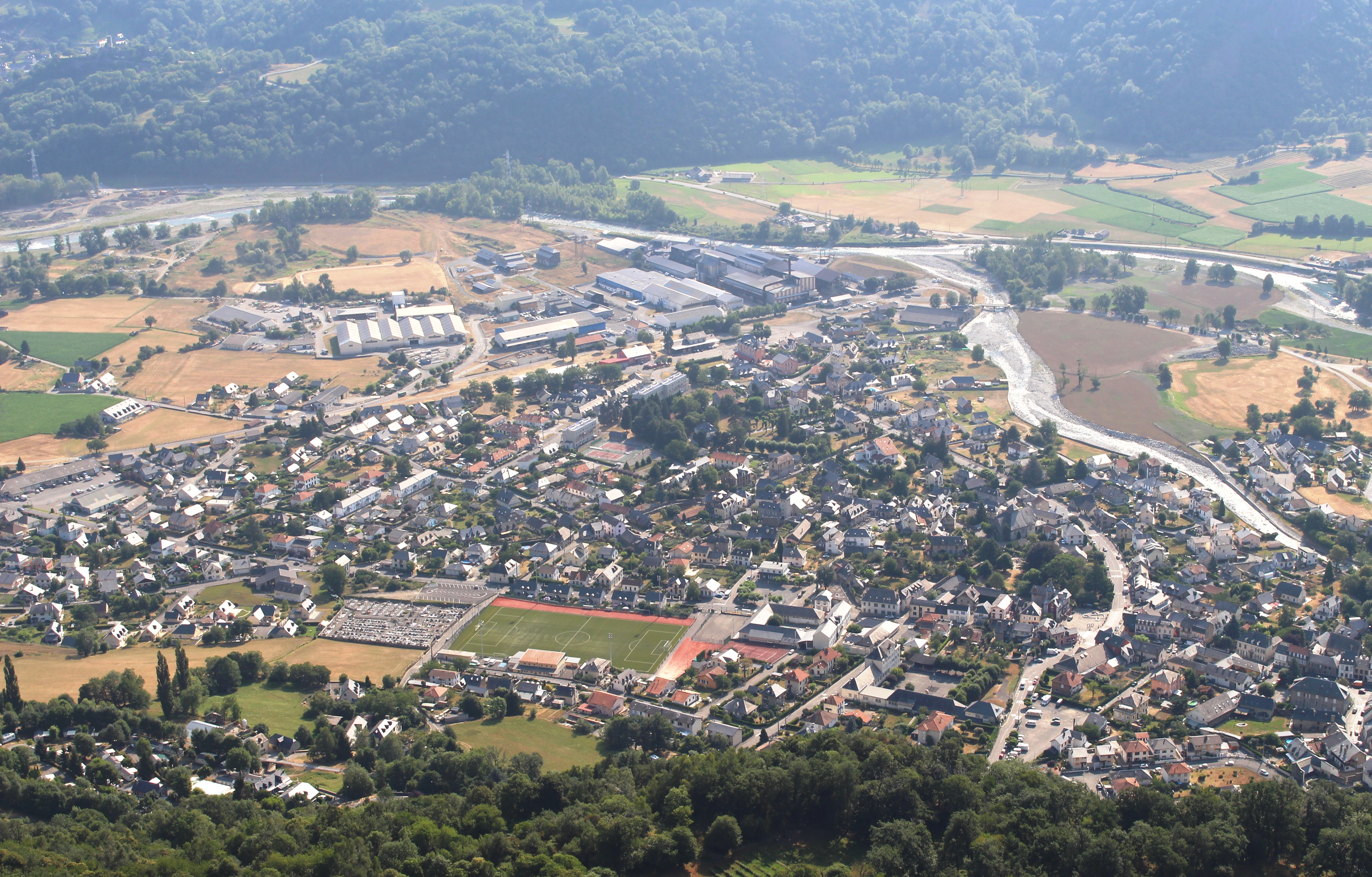 Pierrefitte-Nestalas (Hautes-Pyrénées)